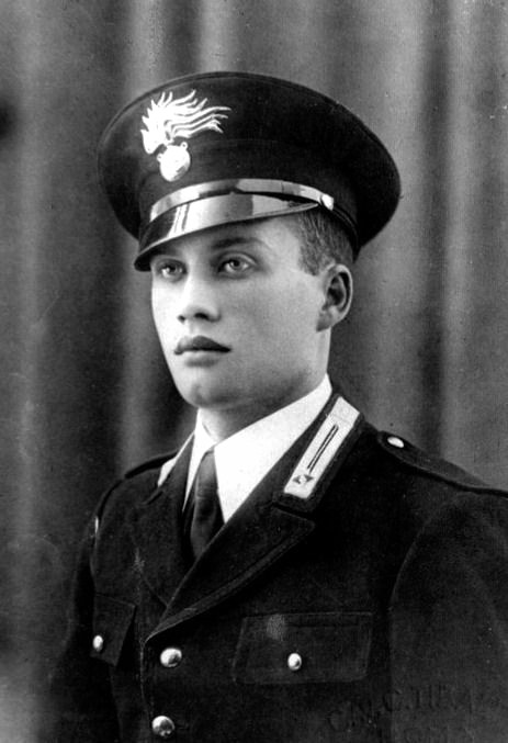 Il vice brigadiere dei carabinieri Salvo D'Acquisto